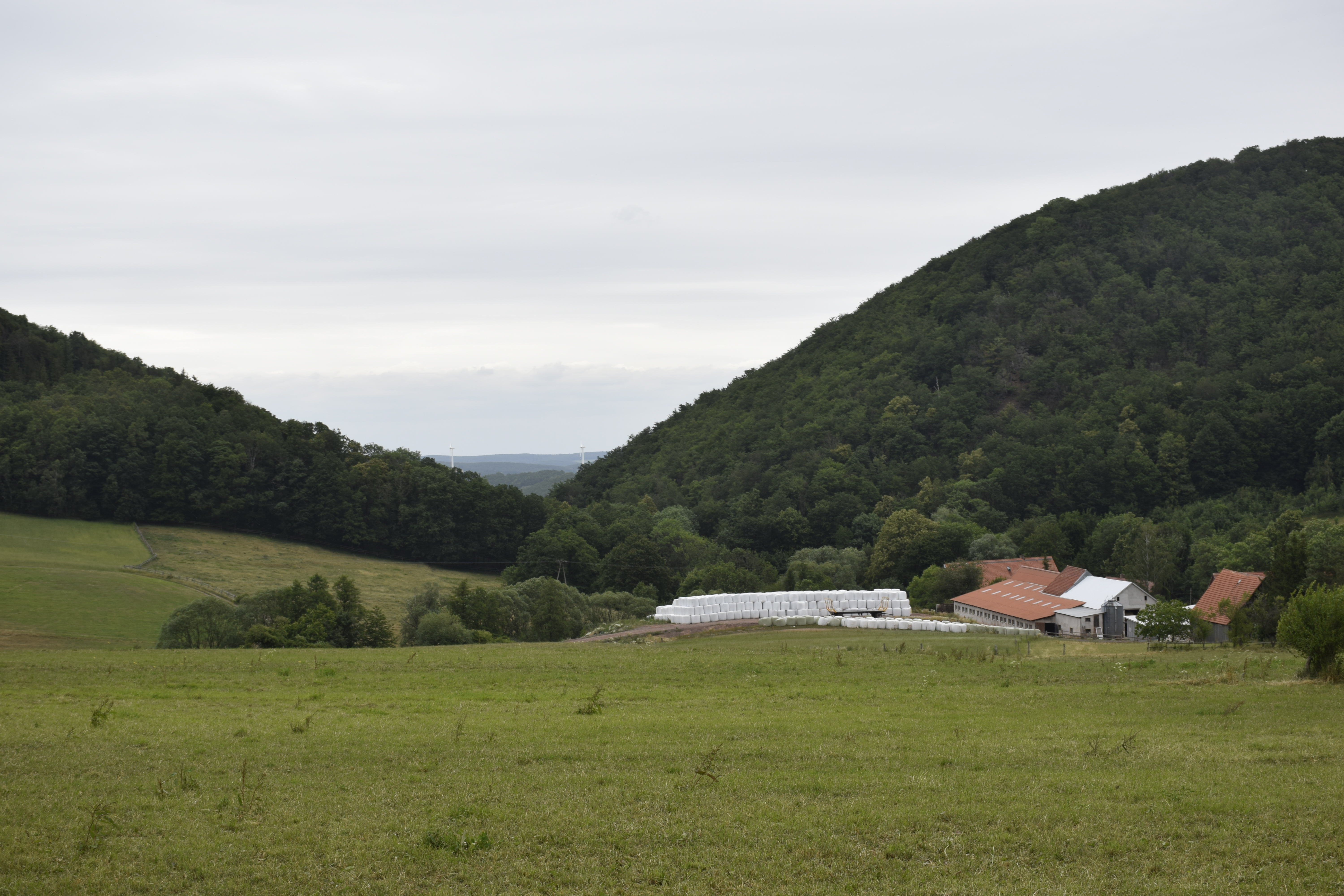 Nagórnik (województwo dolnośląskie). Polska